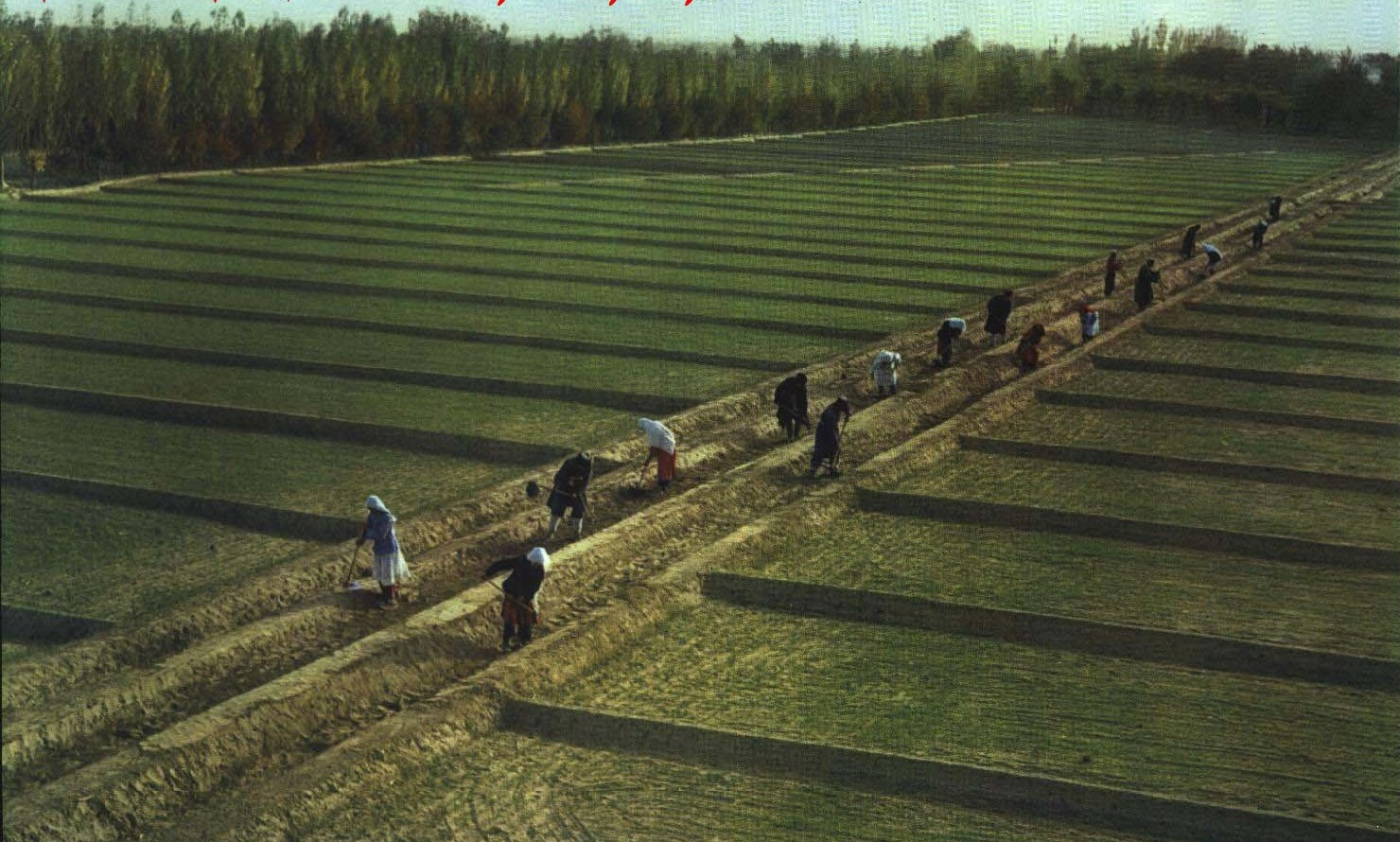 1965-3 1965年 新疆皮山县